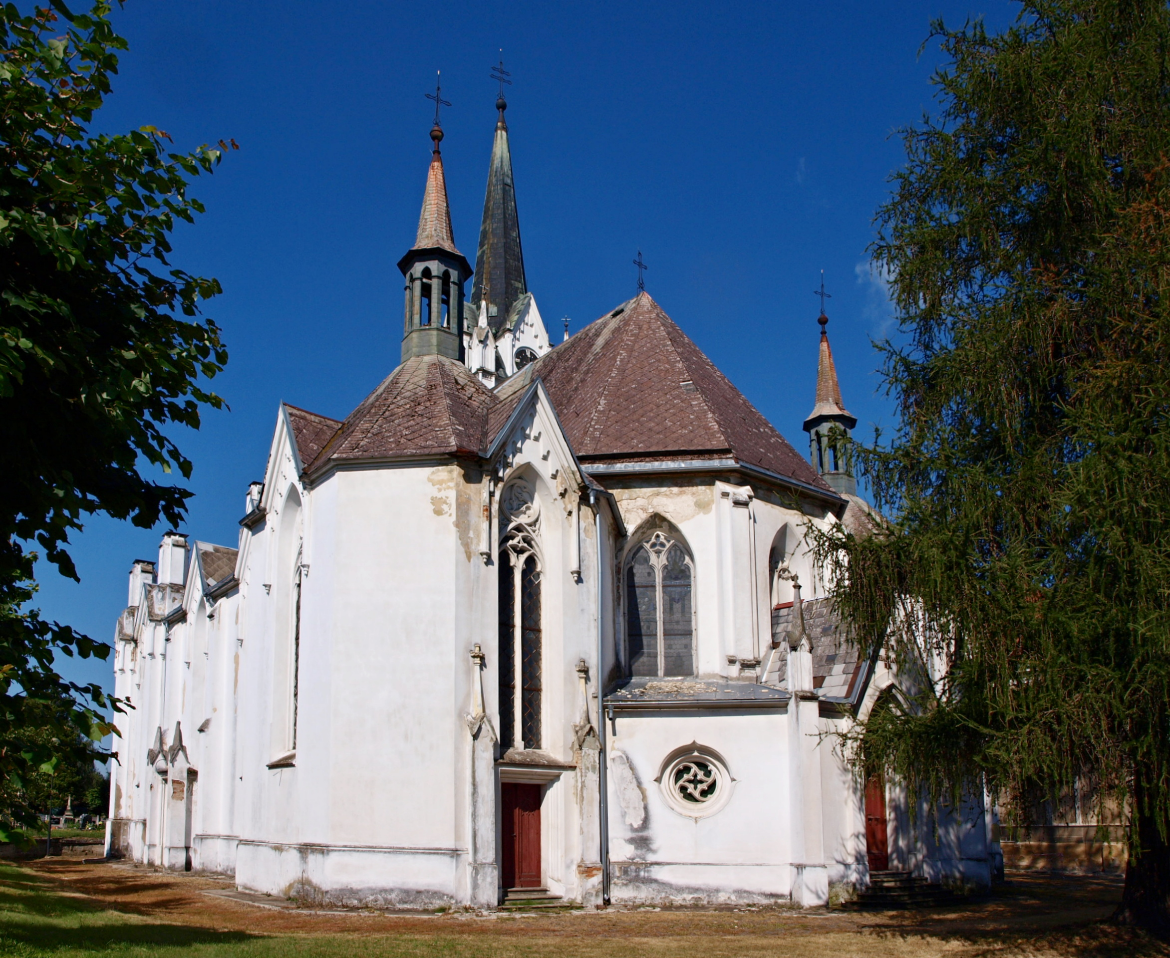 Kostel svatého Fabiána a Šebestiána (Zákupy)